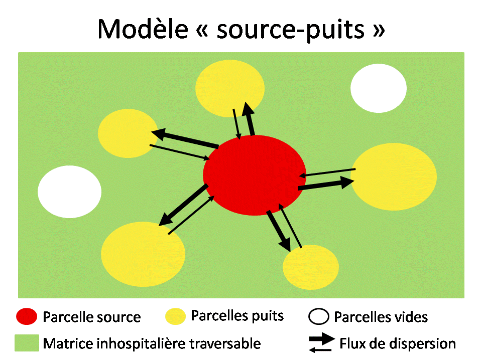 Modèle de dispersion biologique